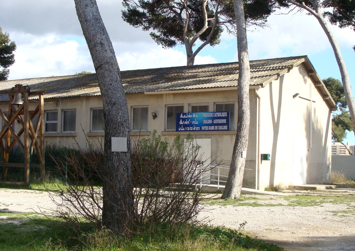 L'église catholique chaldéo-assyrienne Notre-Dame de Chaldée, située dans le parc de la cité Bois-Lemaître, dans le 12e arrondissement de Marseille.